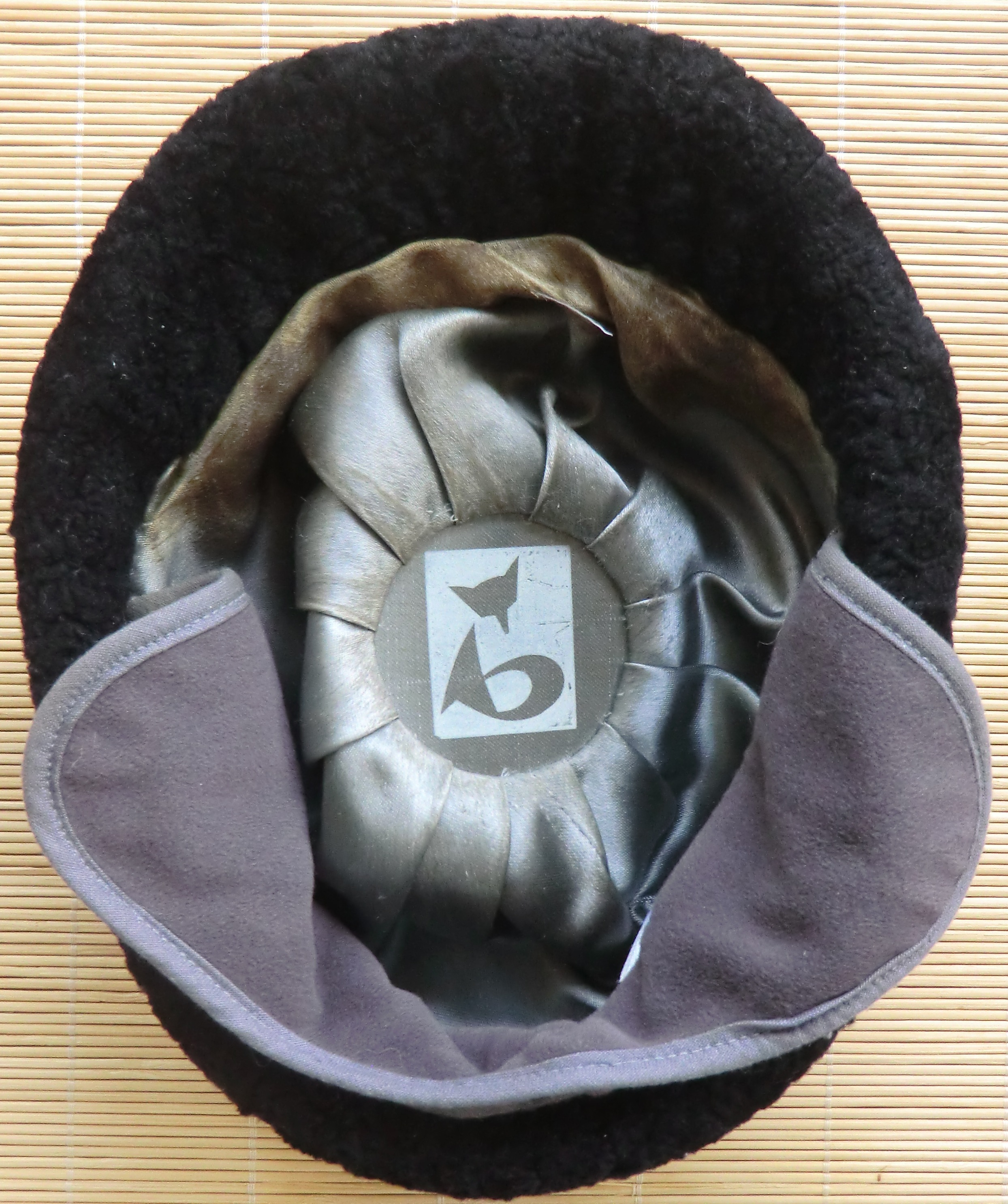 Gotlandlamm-Mütze der VEB Stadtpelz. Gearbeitet in Schkeuditz im Werk II des VEB Stadtpelz, dass 1949 in die Rechtsträgerschaft des VEB Pelzbekleidung Schkeuditz überführt wurde. Hier wurden mehrheitlich Mützen hergestellt (Logo = Interpelz).